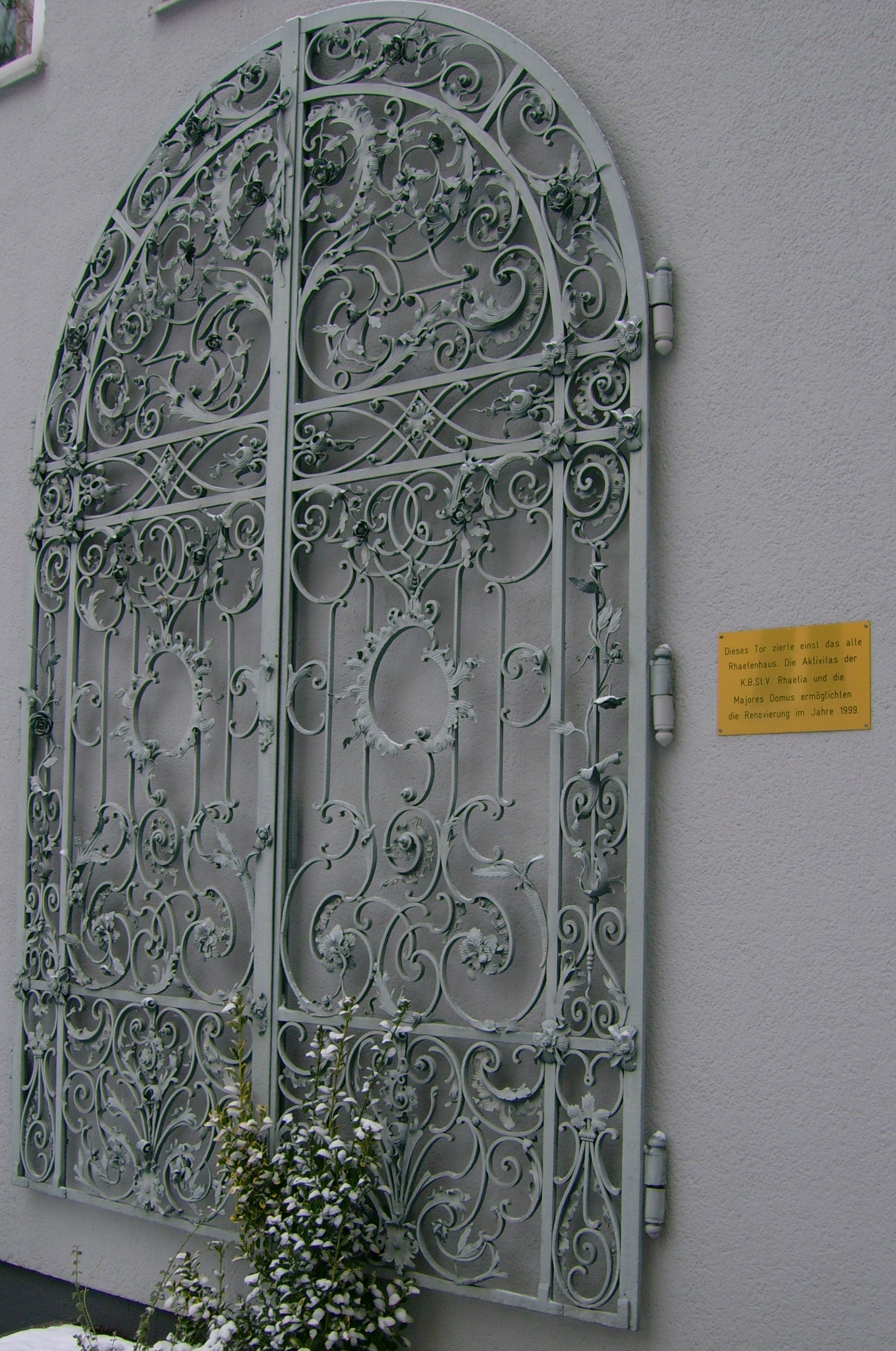 Rhaetenhaus